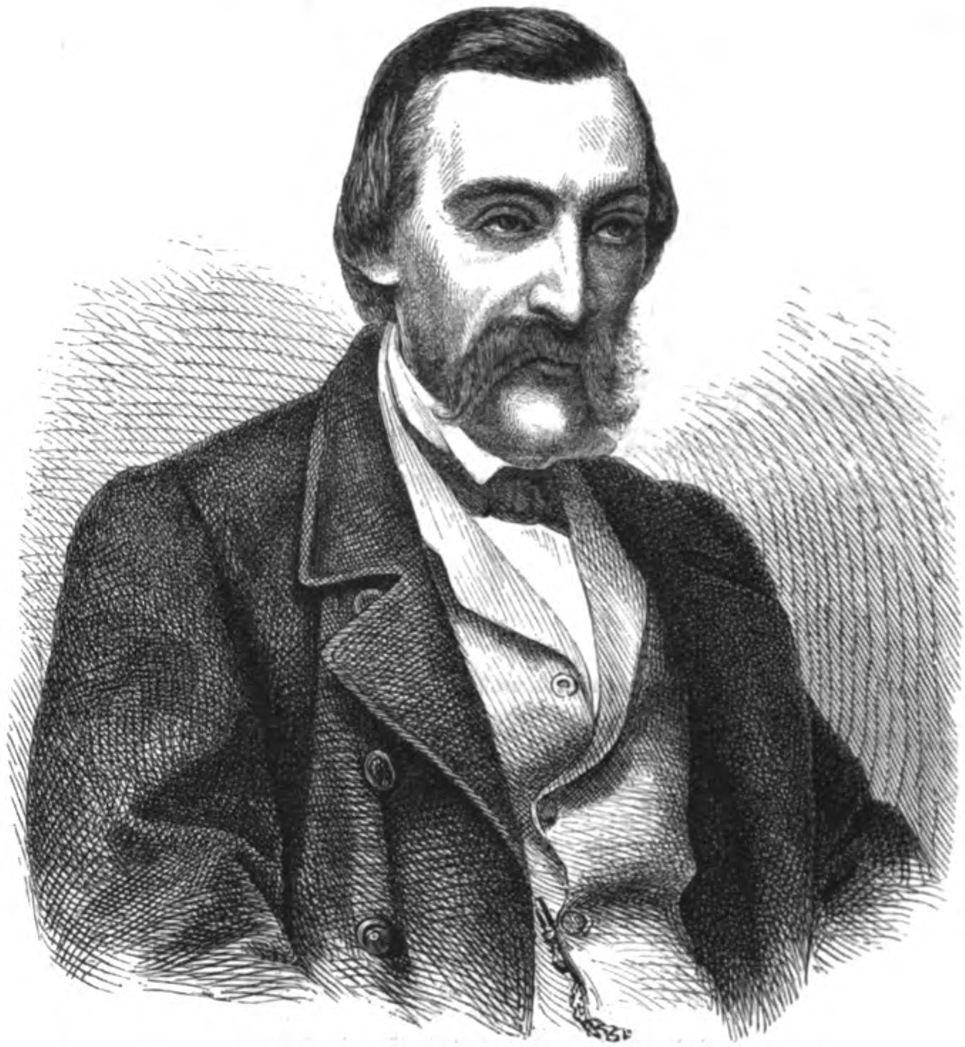 Peter von Chlumecky, österreichischer Historiker, 1863.